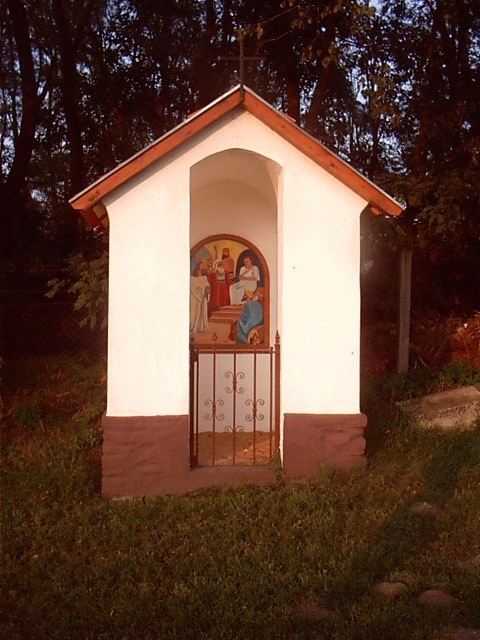 Bakonygyiróti temetőkápolna / Chapel in the cemetery of Bakonygyirót